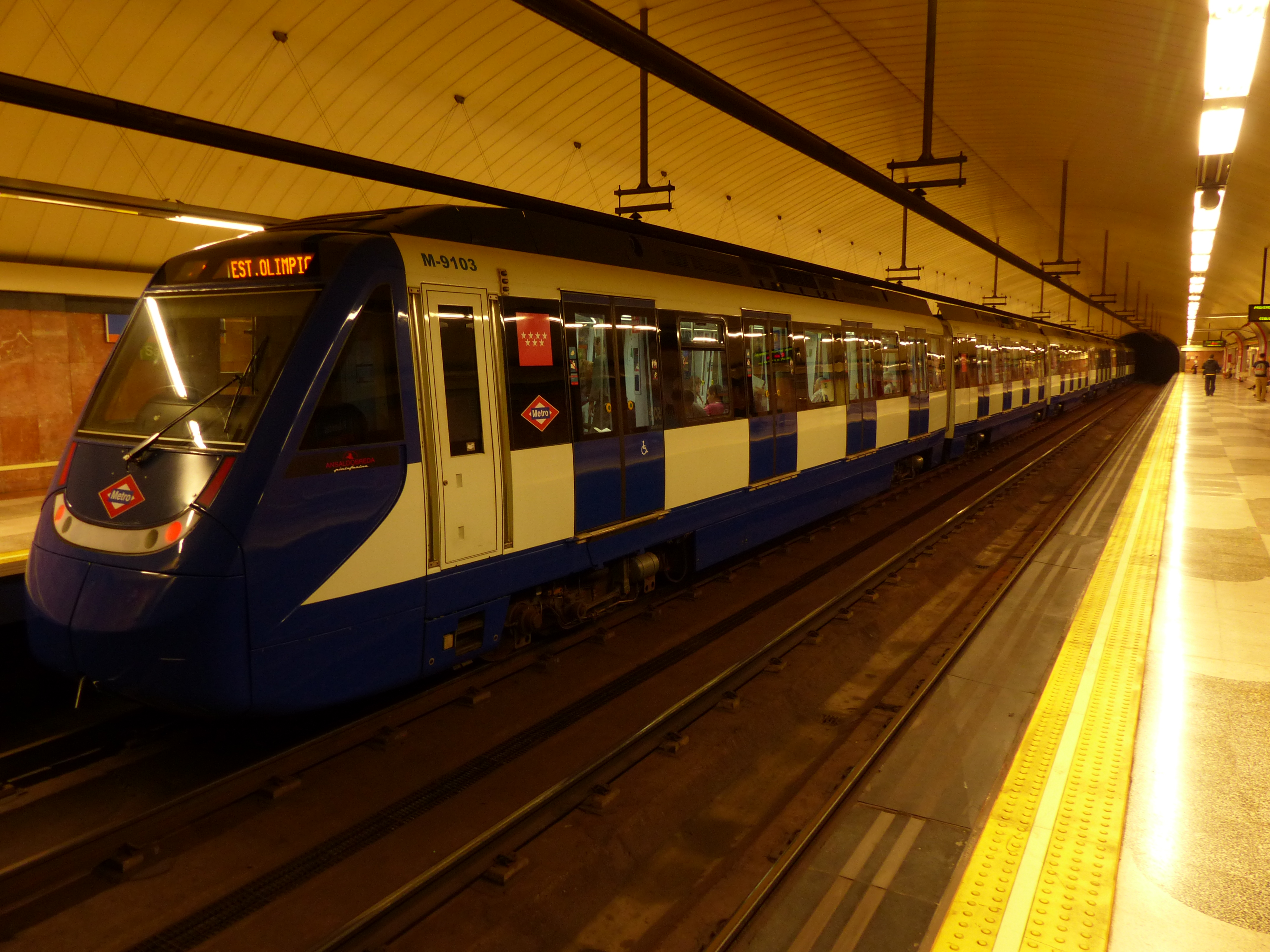 Estación Parque de las Avenidas, el metro en la estación.